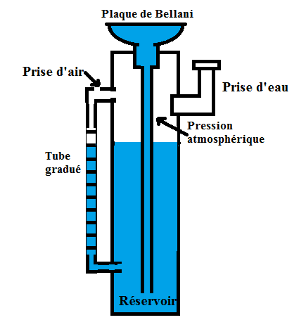 L’atmomètre ou la plaque de Bellani est constitué d'une cuve cylindrique graduée, environ 30 cm de haut, qui alimente par l'intermédiaire d'un tuyau d'aspiration, une surface d'évaporation constitué par un disque d'environ 7,5 cm de diamètres de céramique poreuse. Le dispositif est placé à environ 120 cm du sol6. L'eau qui s'évapore par le disque est remplacée immédiatement par une quantité égale venant de la cuve qui est sous pression. L'utilisateur peut ainsi noter le changement du niveau d'eau dans la cuve et donc l'évaporation.